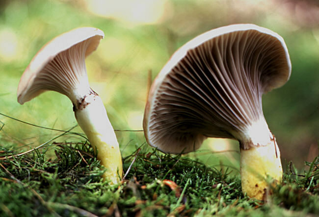 Großer Schmierling Fotograf: Walter J. Pilsak, Waldsassen Copyright Status: GNU Freie Dokumentationslizenz